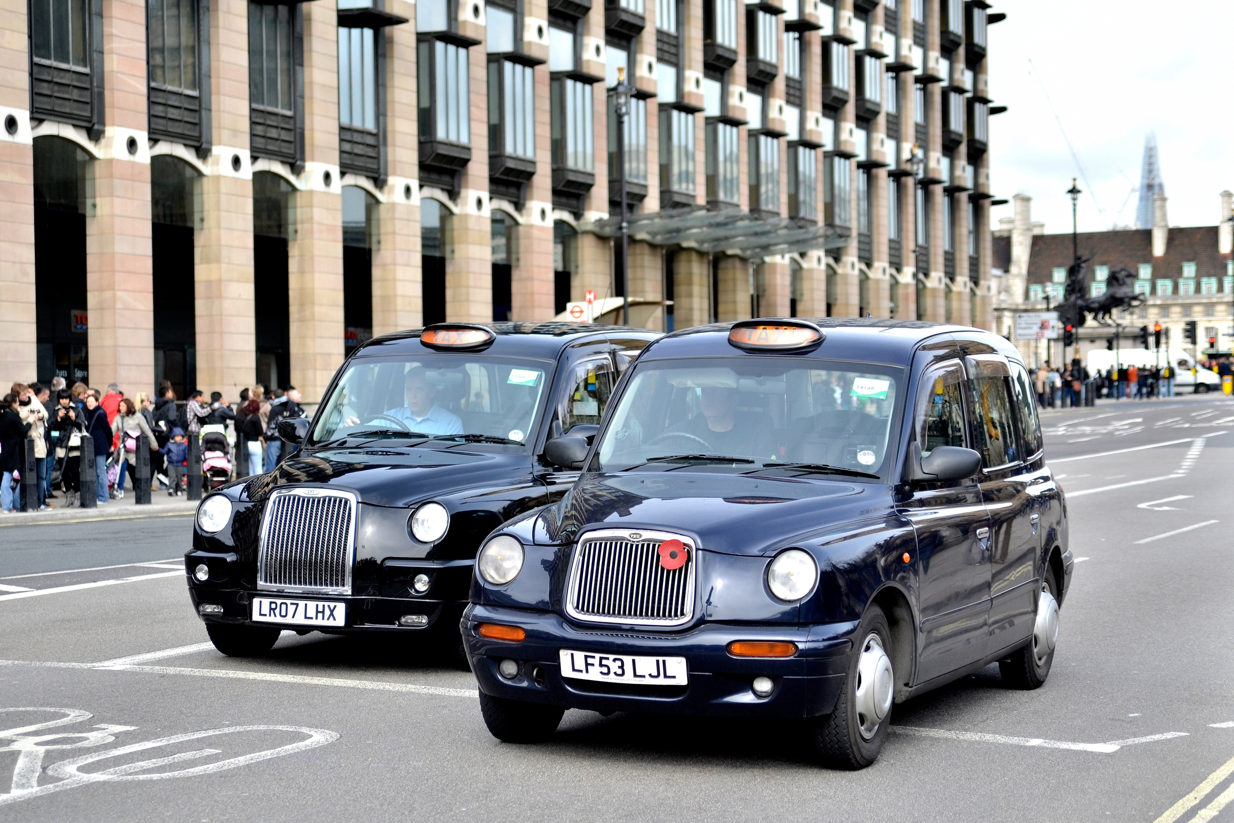 London